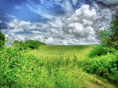 prato dell'inviolata